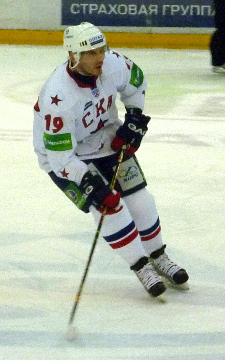 Нападающий СКА СПб Алексей Яшин во время игры с нижегородским «Торпедо» 12 декабря 2010